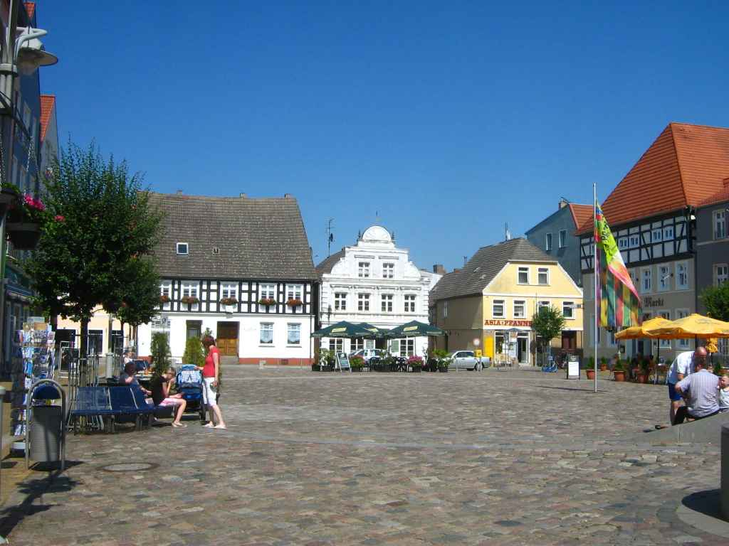 Ueckermünde, Marktplatz örtlicher Akkordeonmusiker: Volker Hoffmann